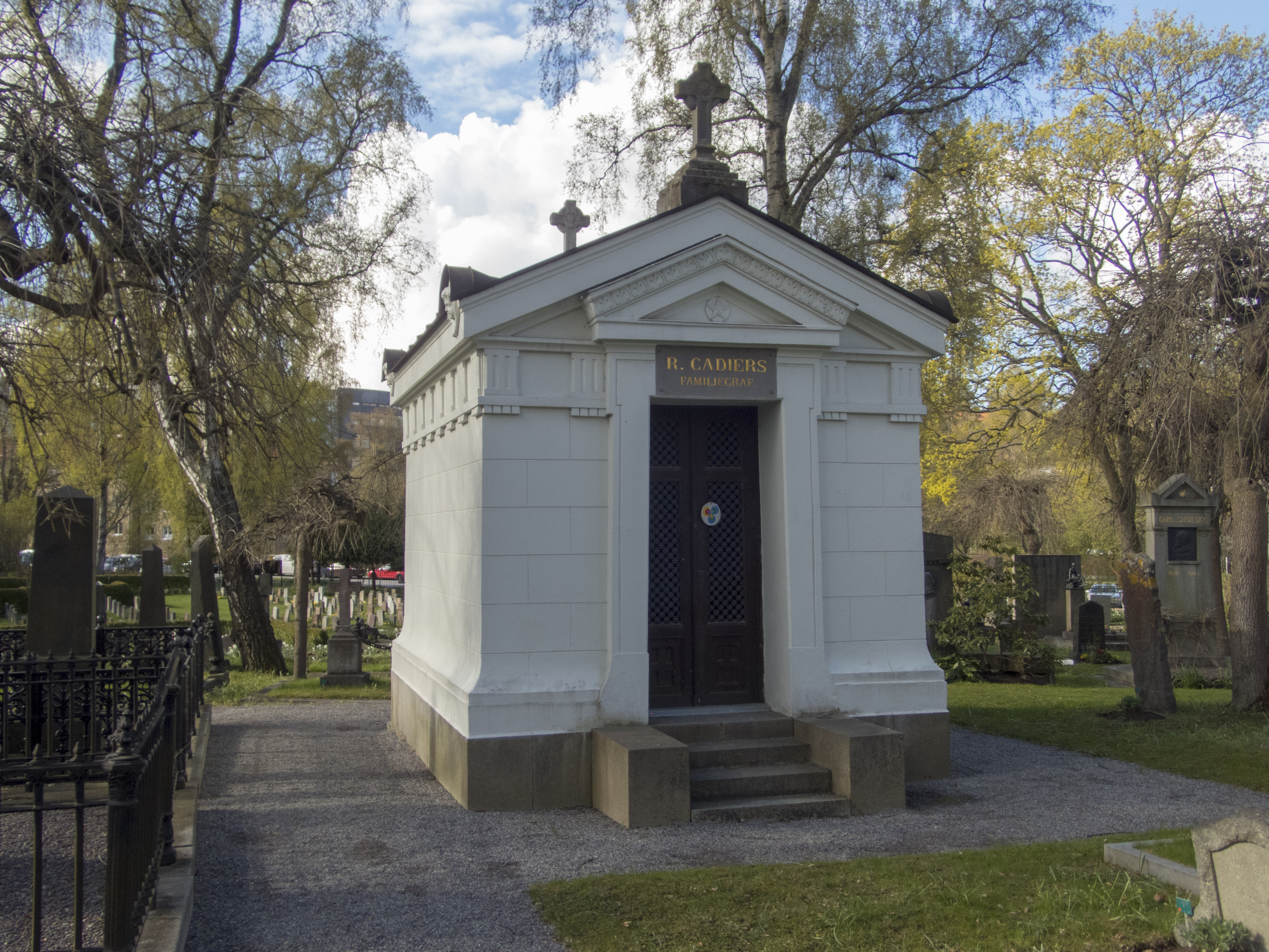 Regis Cadiérs gravkor på Solna kyrkogård från 1873.